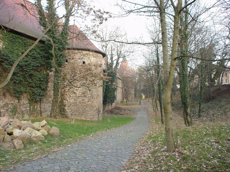 Giebichenstein Burg public domain eigenes Foto von 2002Mewes 19:52, 5. Feb 2005 (CET) spätgotische Ringmauer der Unterburg mit Flankierungstürmen und Burggraben.